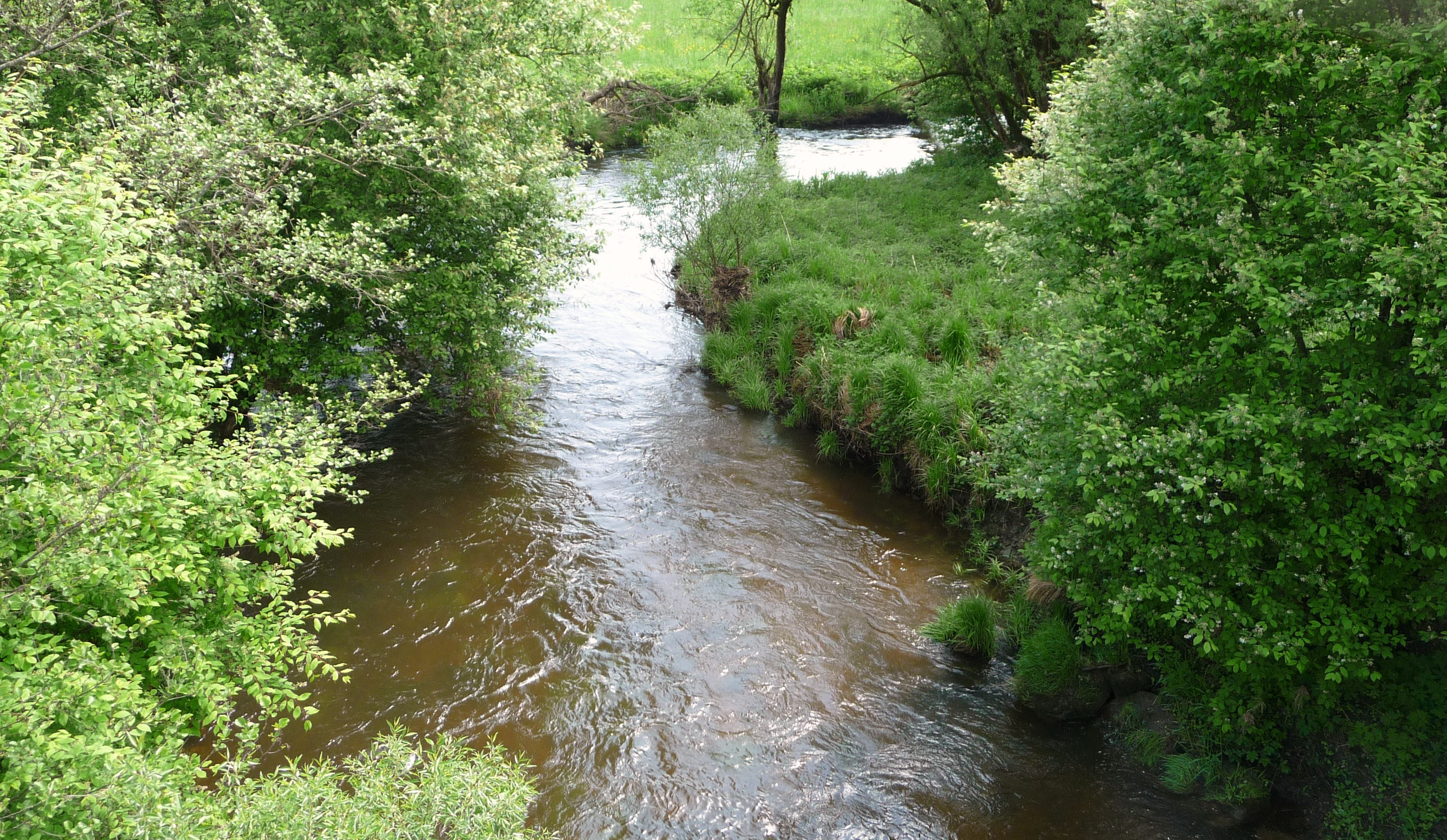 Die Mitternacher Ohe bei Eberhardsreuth unterhalb der Bundesstraße 85